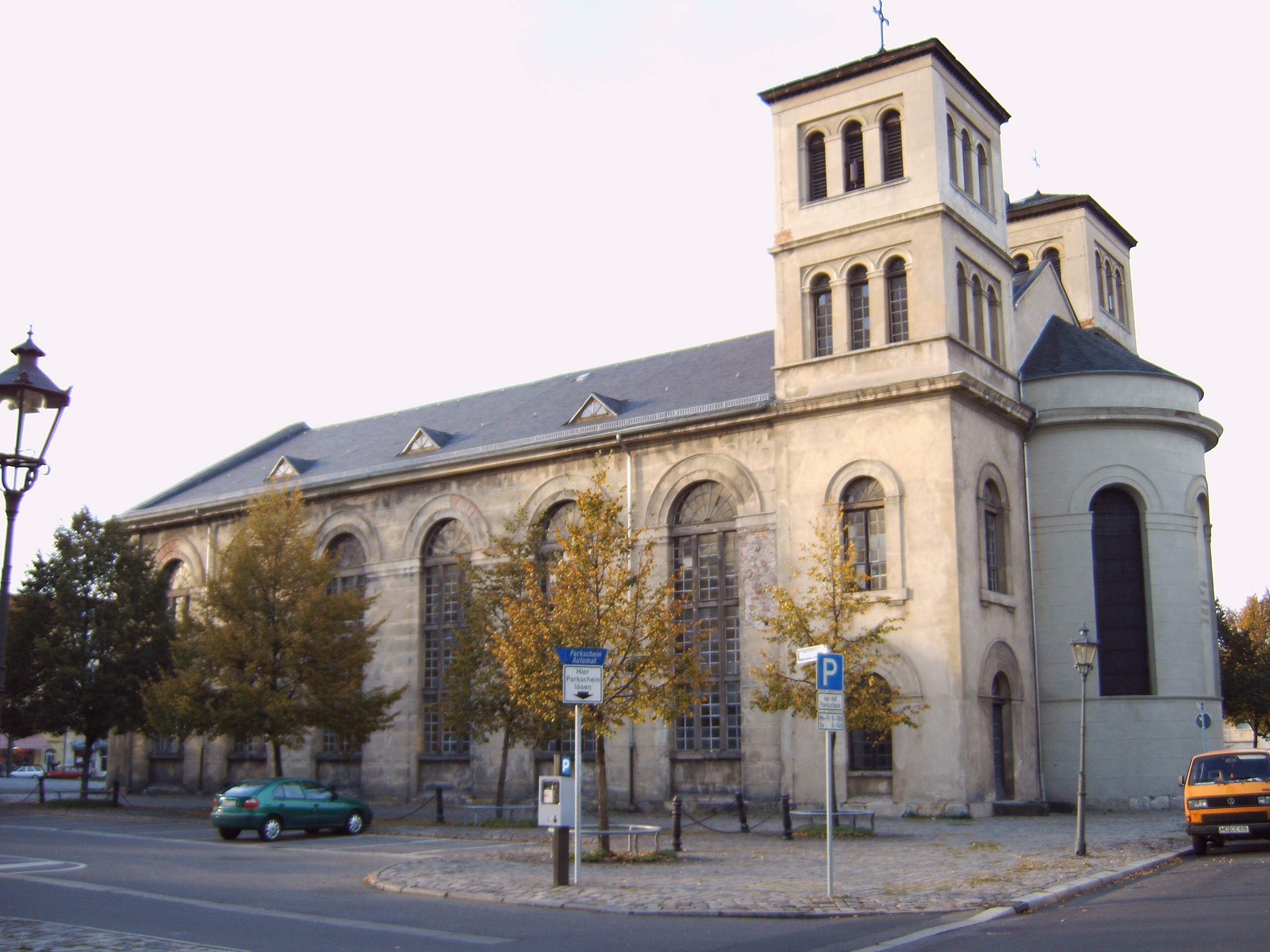 Nicolaikirche in Magdeburg-Neue Neustadt, Südseite